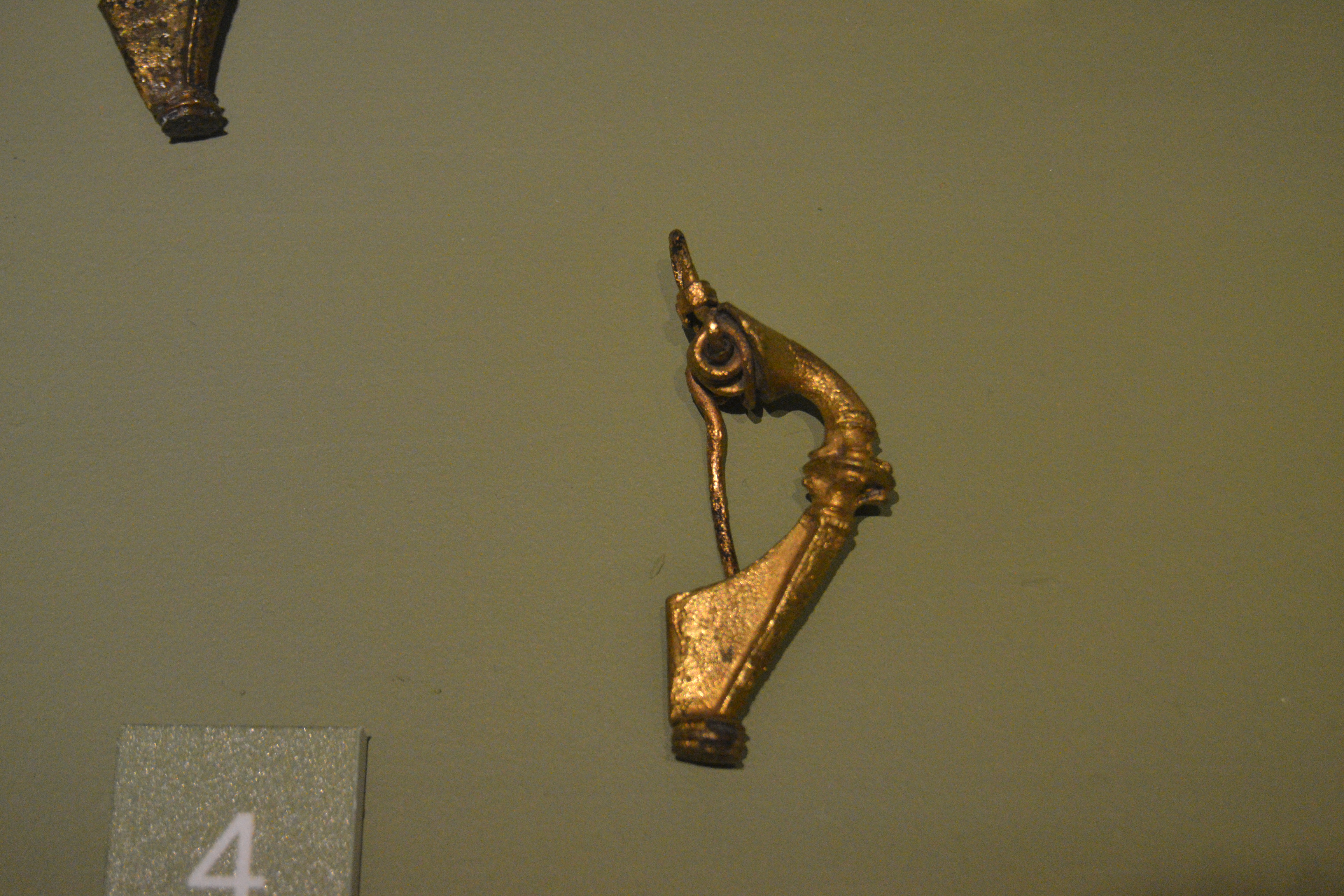 Romersk smykker